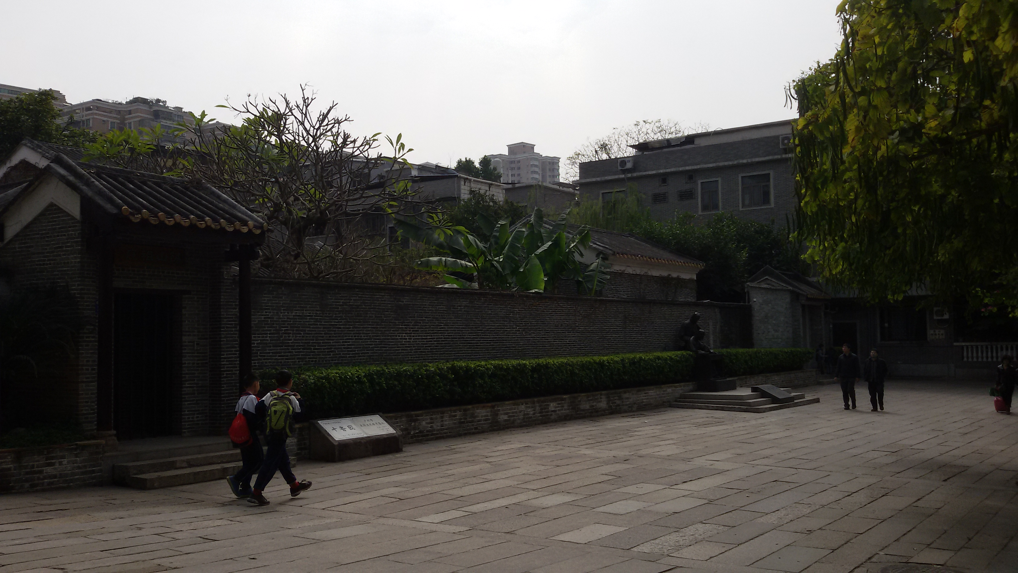 粵語: 十香園紀念館出面嘅廣場